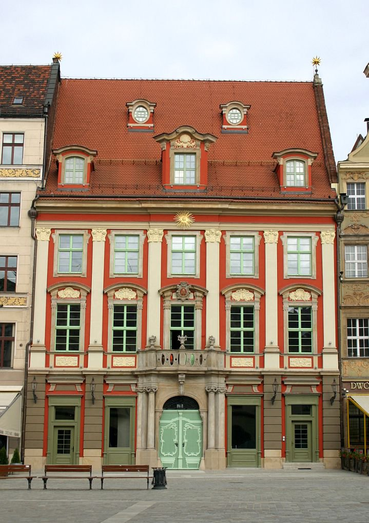 Haus Zur Goldenen Sonne, Sieben-Kurfürsten-Seite (Westseite), Großer Ring 6, Breslau, Niederschlesien, Polen.